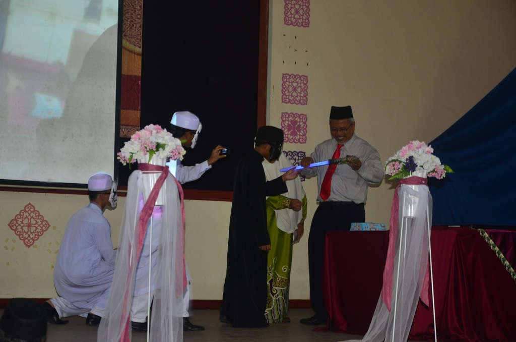 Tuan Haji Addenan Bin Osman, Pengetua SEPINTAR sedang merasmikan Karnival Dakwah Bidang Pendidkan Islam pada 3 Mei 2016 di Dewan Al-Aqsa.